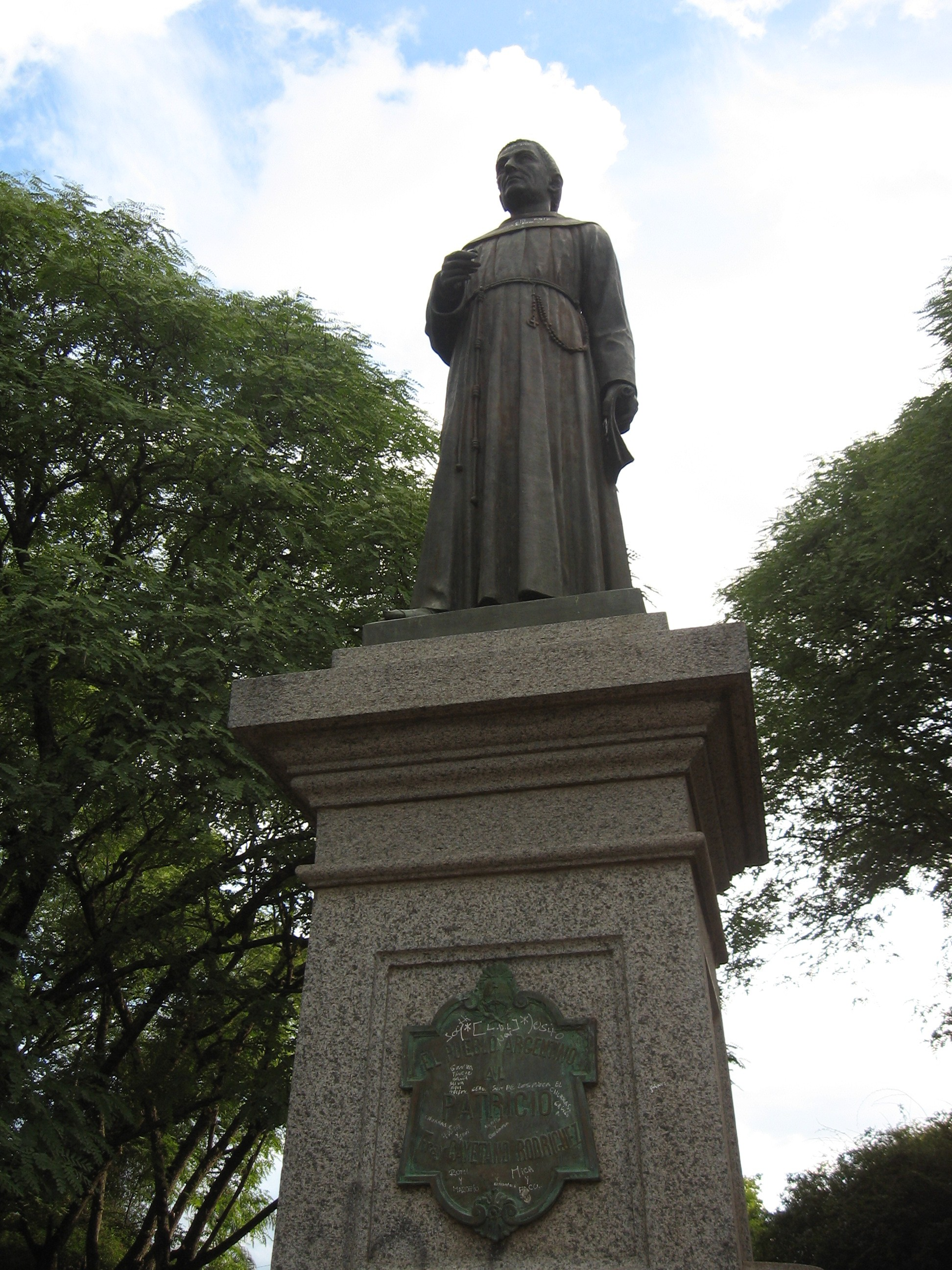 Estatua al Fray Cayetano Rodríguez, en la ciudad de San Pedro